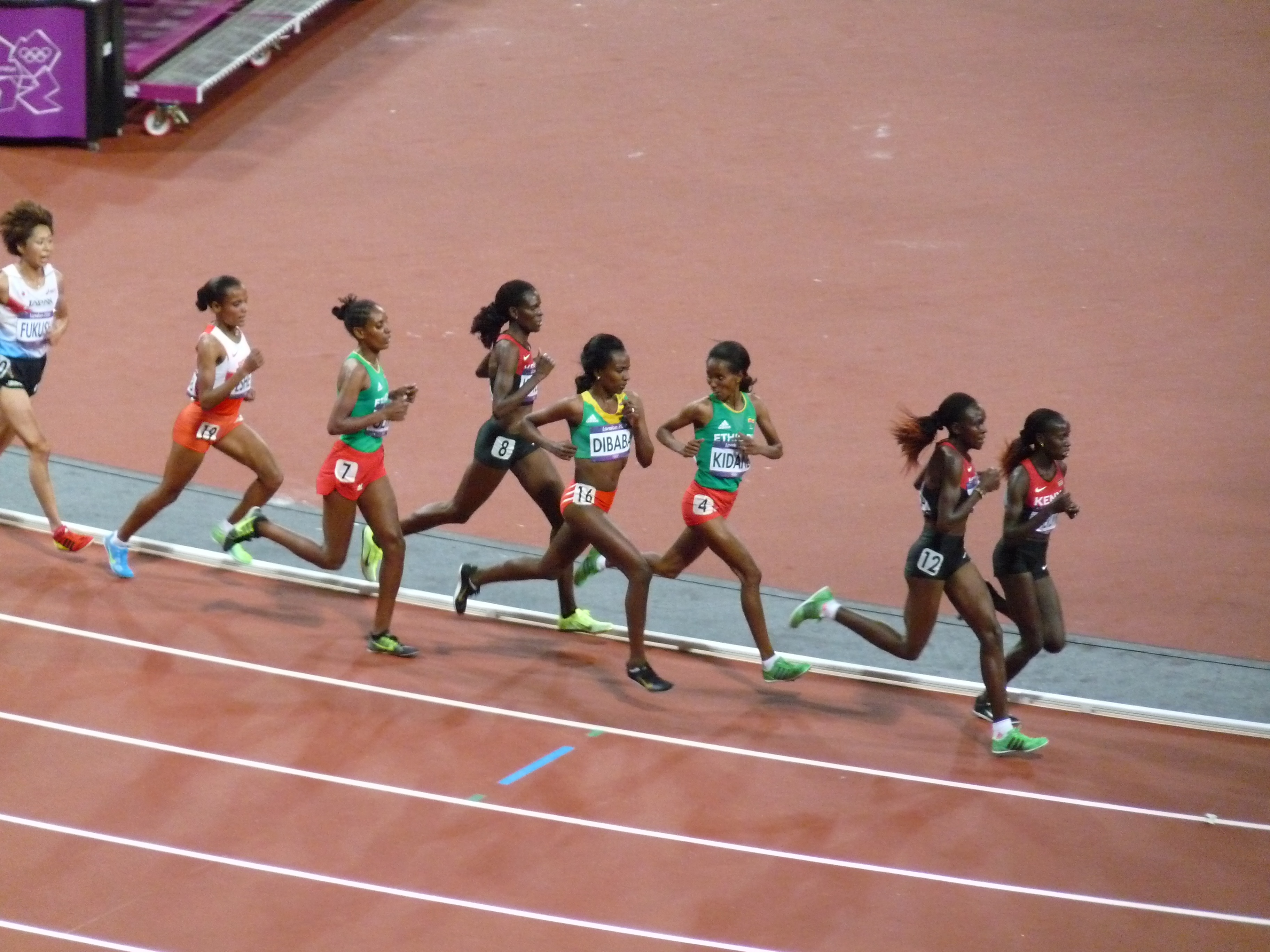 Women's 10k Final, Kayoko Fukushi, Shitaye Eshete, Beleynesh Oljira, Sally Jepkosgei Kipyego, Tirunesh Dibaba, Werknesh Kidane, Joyce Chepkirui, Vivian Jepkemoi Cheruiyot